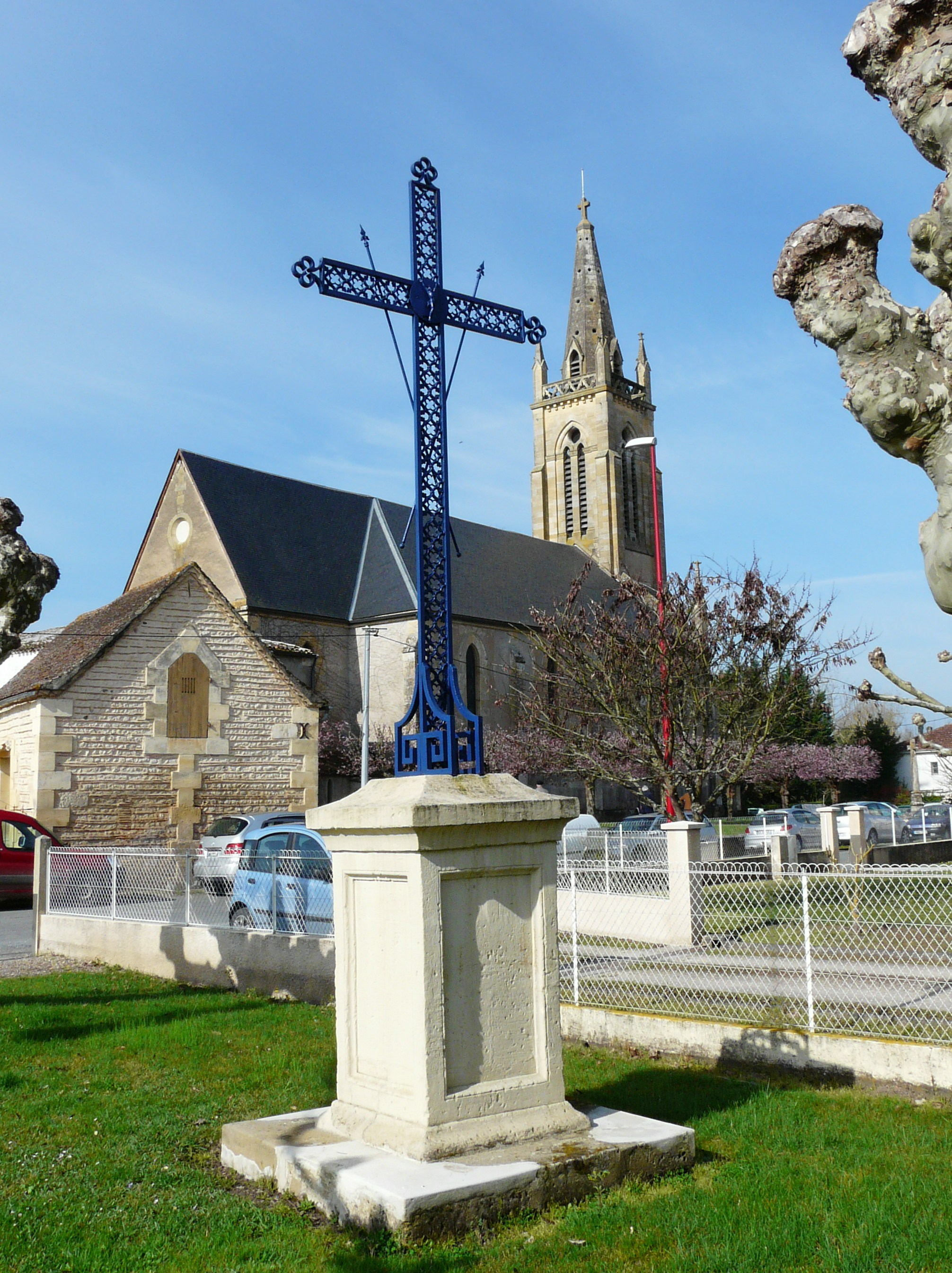 Croix devant l'église Saint-Pierre-et-Saint-Paul, Saint-Pierre-d'Eyraud, Dordogne, France.